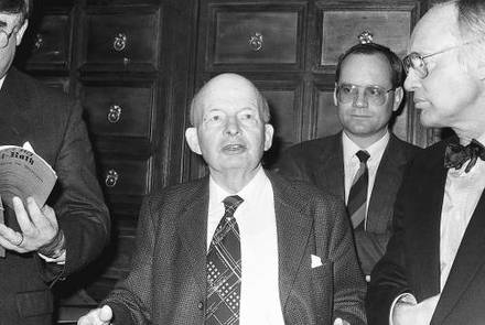 Freiburg im Breisgau: Prof. Thieme und Dr. Große-Ruyken bei der Vorstellung des restaurierten Archivraums in der Gerichtslaube